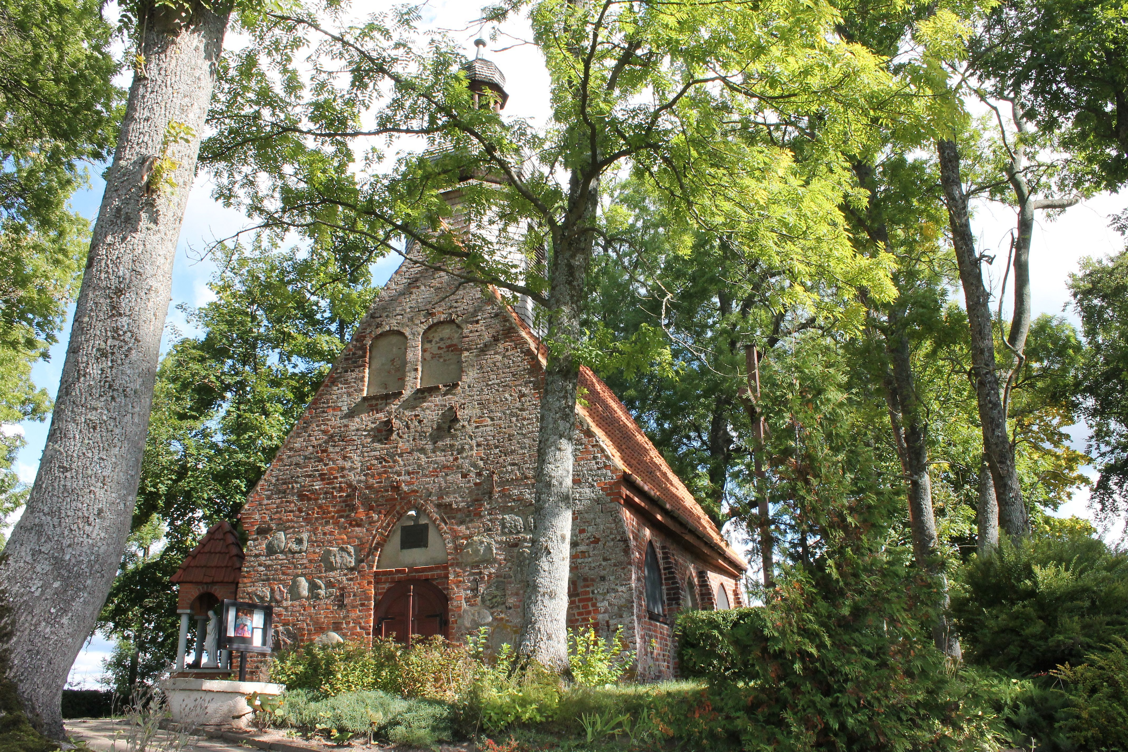 Bonin, gmina Manowo- powiat koszaliński.Kaplica ewangelicka, ob. kościół rzym.-kat. fil. p.w. św. Izydora, XV/XVI, 1979 (658966)